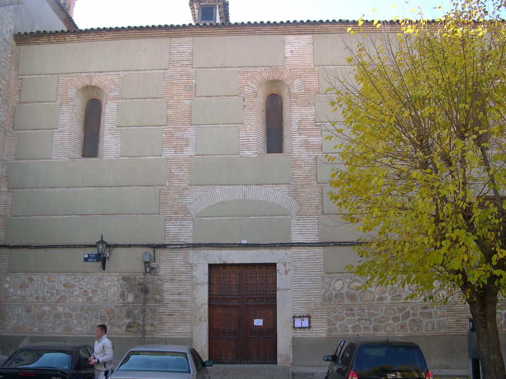 Convento de Santa Clara en Ocaña (Toledo).